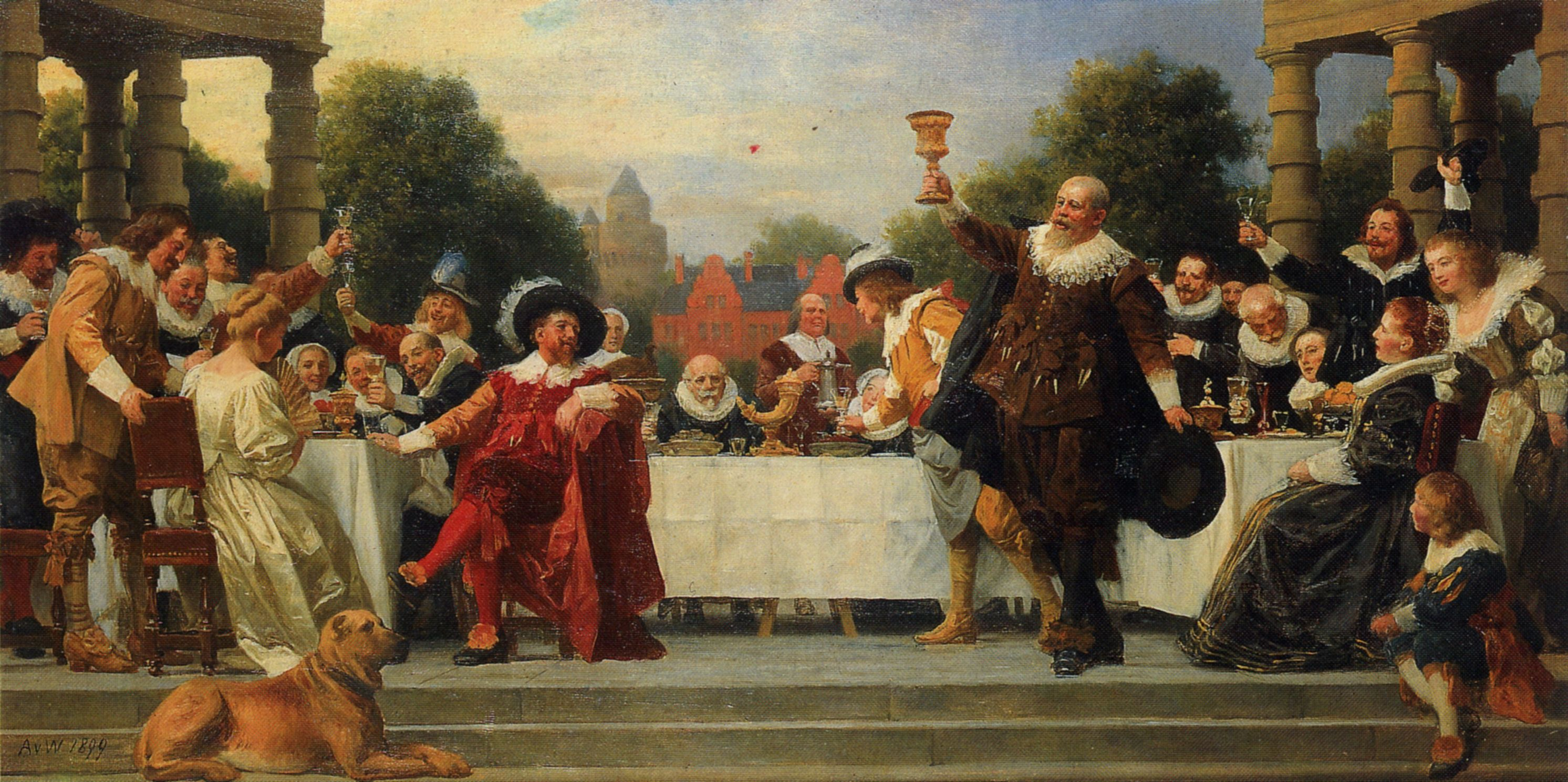 Farbskizze zum Wandbild Das Gastmahl der Familie Mosse im ehemaligen Palais Mosse; Berlin Museum, Abteilung Jüdisches Museum, Berlin; 46 × 89 cm, Öl auf Leinwand